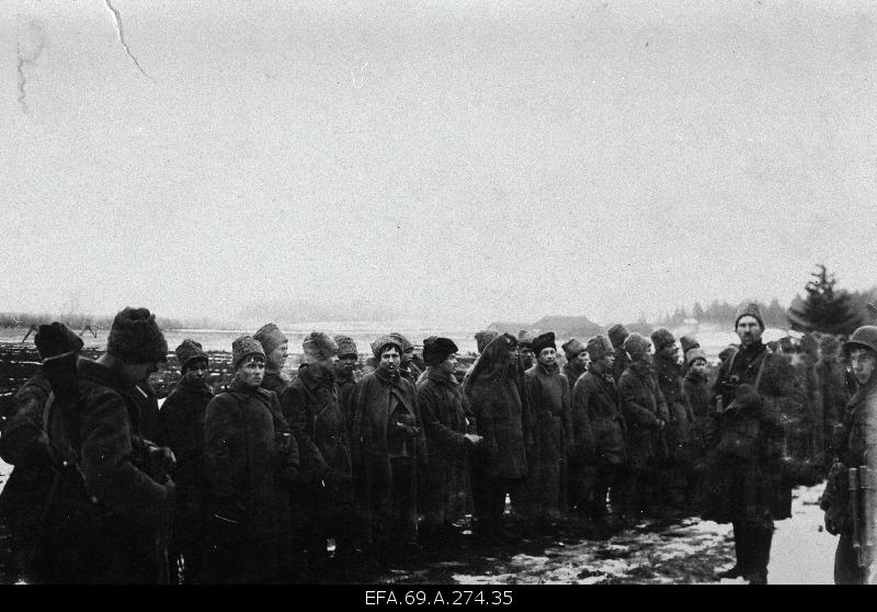 Tapa vallutamisel vangistatud punaarmeelased. Paremal (binokliga) soomusrongide üldjuht kapten Karl Parts